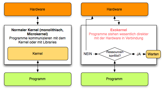 Neue version der SVG-Version. Das Bild beschreibt die Unterschiede zwischen einen Exokernel und einem monolithischen Kernel. Es ist nicht 100% exakt und beleuchtet den Aspekt der Ressourcenkonflikte nicht, aber das kann man ja in den Text schreiben ;) Zu viele Details verderben die Übersicht